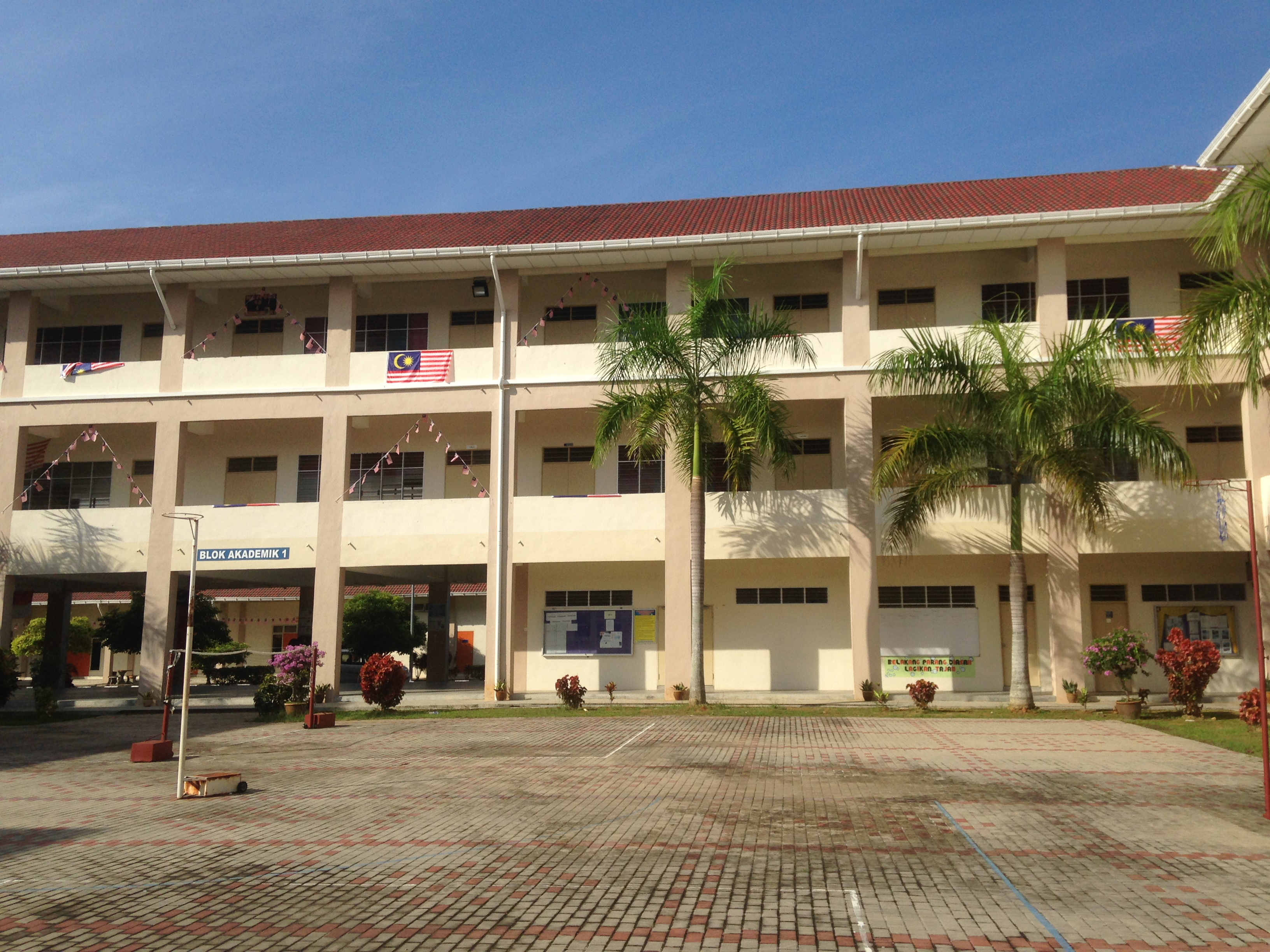 panorama sekolah